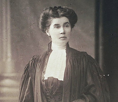 Portrait der griechischen Ärztin Mary Kalopothakes (eigentlich Maria Kalopothaki, griechisch Μαρία Καλoποθάκη; 1859-1941)